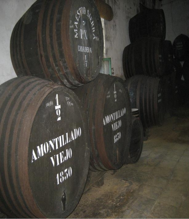 Botas de Amontillado de Jerez